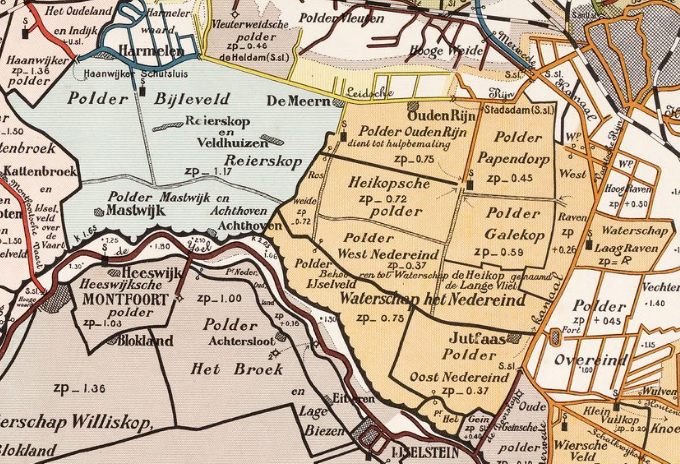 Polder Heycop